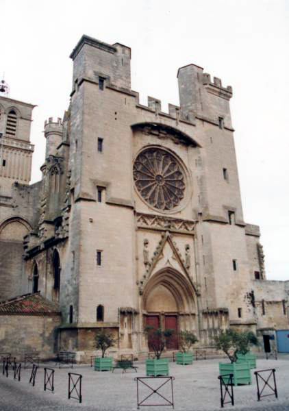 Cathédrale St Nazaire de Béziers, France